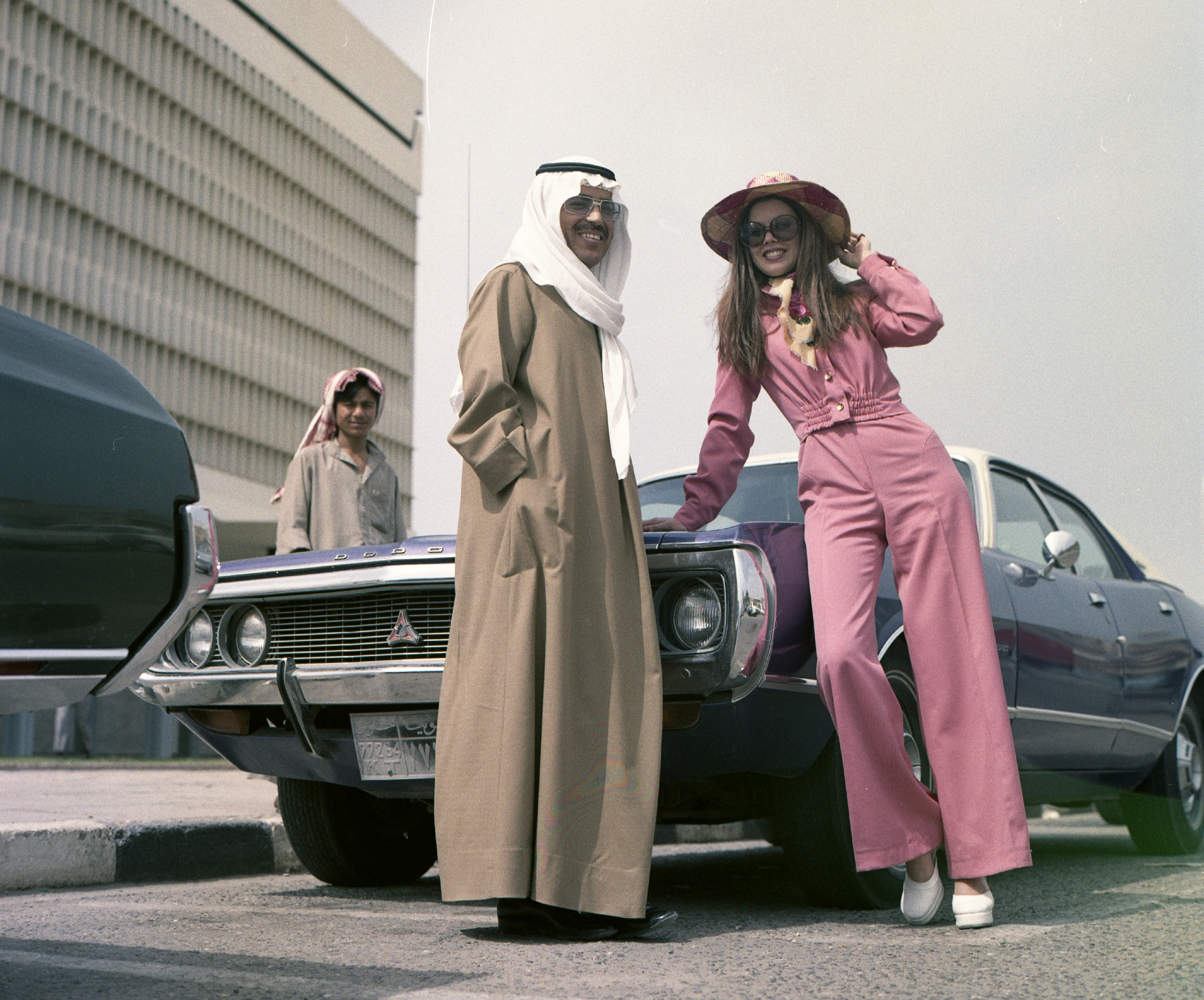 Felkai Anikó manöken. Tags: colorful, fashion, automobile, Dodge-brand, american brand, lady, dungarees, shades, scarf, platform shoes, head-gear Title: Felkai Anikó manöken.